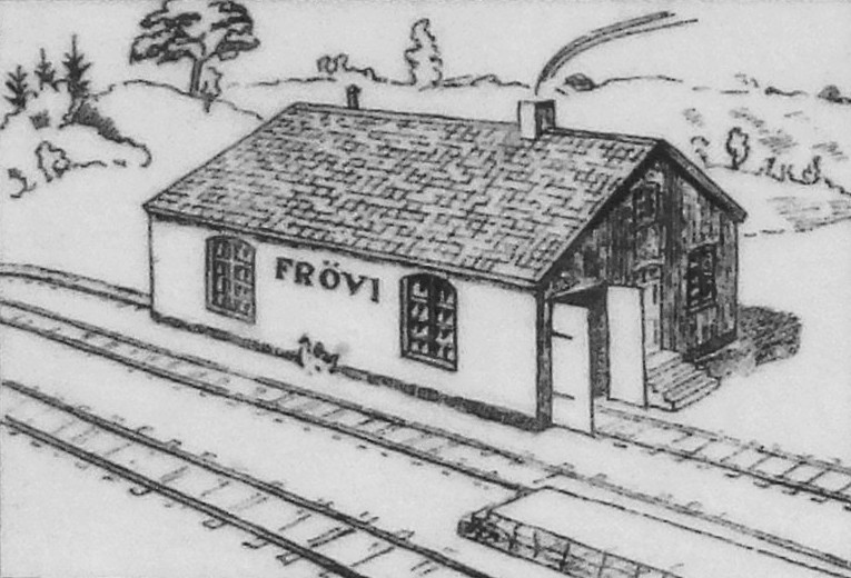 Frövis första stationshus